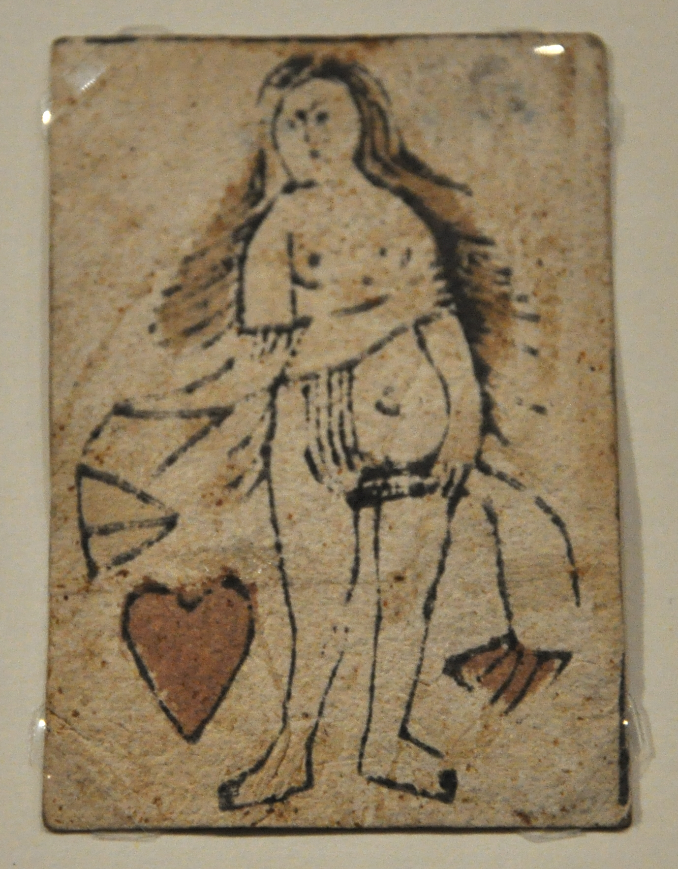 Bregenz, Vorarlberg Museum, Spielkarte vorarlberg museum Native namevorarlberg museumLocationBregenz, Vorarlberg, AustriaCoordinates47° 30′ 16″ N, 9° 44′ 48″ E Established1857WebsiteVorarlberg Museum websiteAuthority control VIAF: 124091336 LCCN: n50051186 GND: 18871-2 SUDOC: 030717523 BNF: 122077592 WorldCat